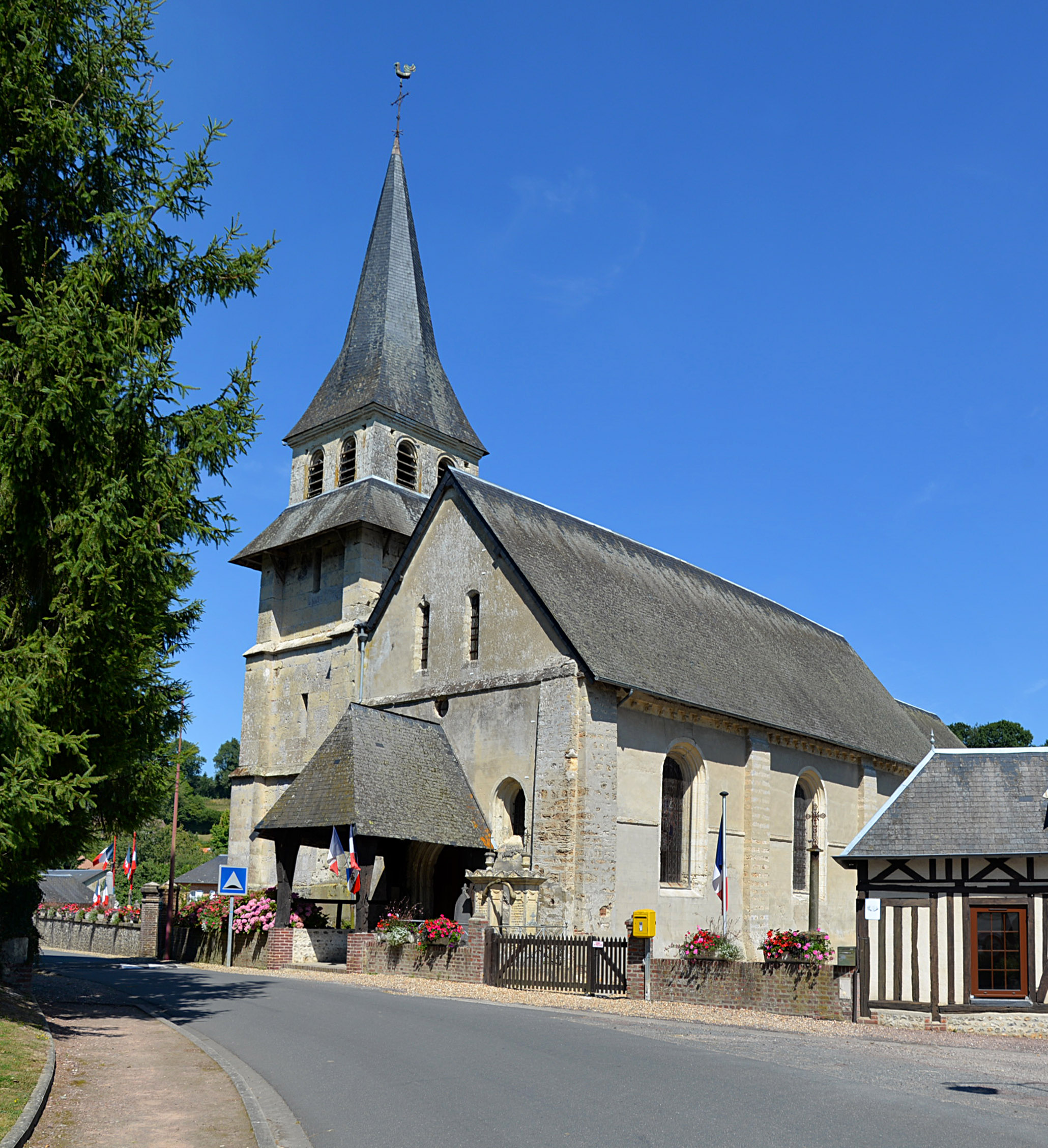 Clarbec (Calvados)